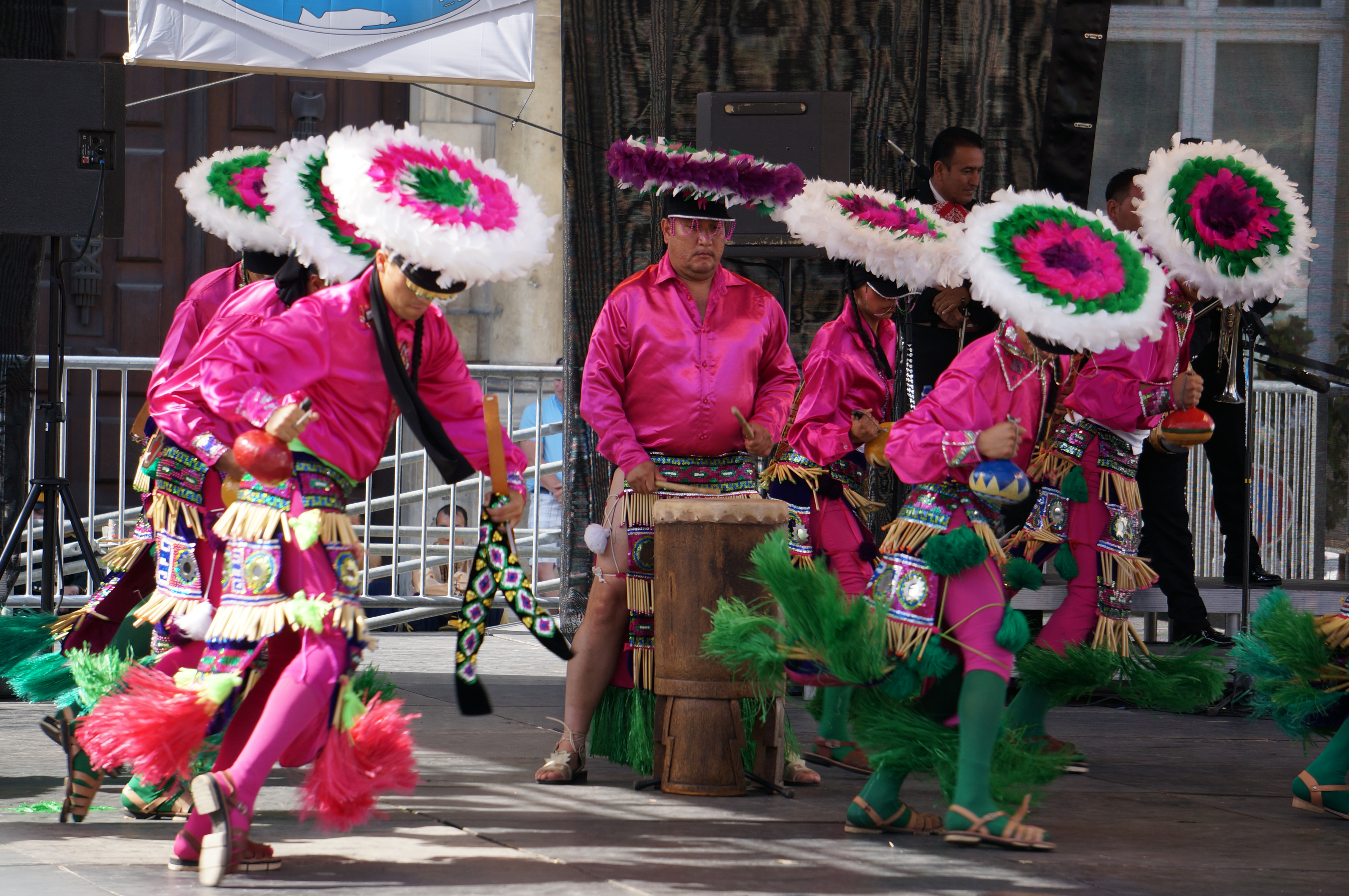 lors des Sacre du folklore 2014.